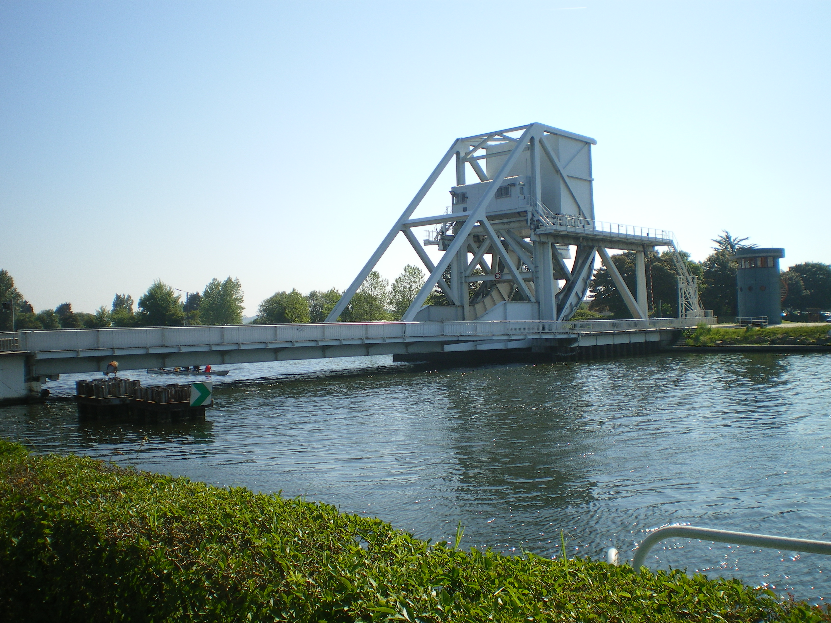 Pegasus Bridge à Bénouville, sur la Canal de Cean à la mer.